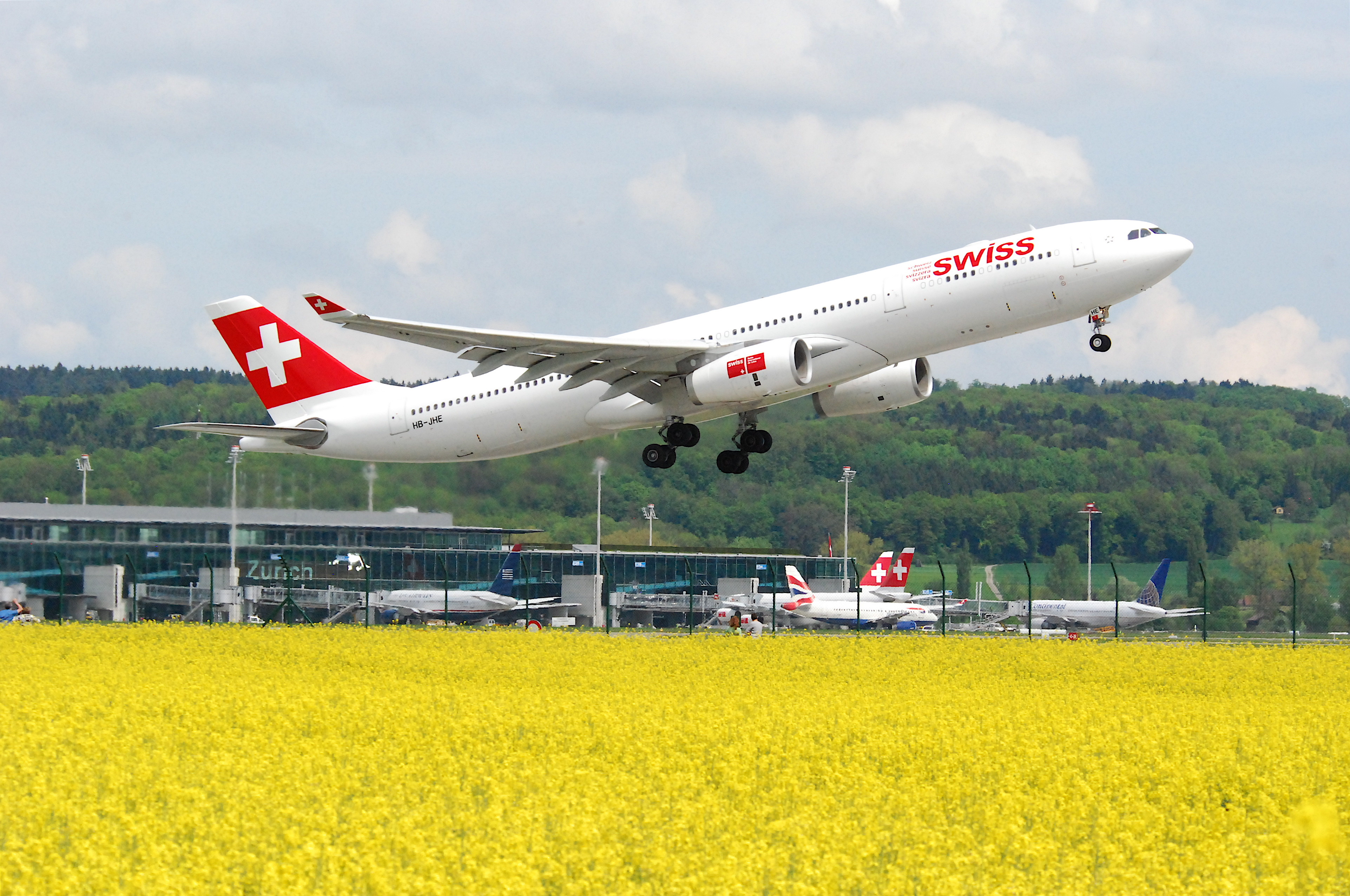 HB-JHE@ZRH;09.05.2010/571cf